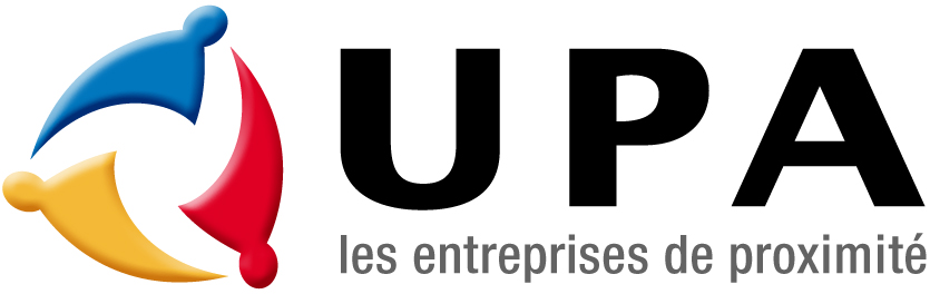 logotype de l'UPA